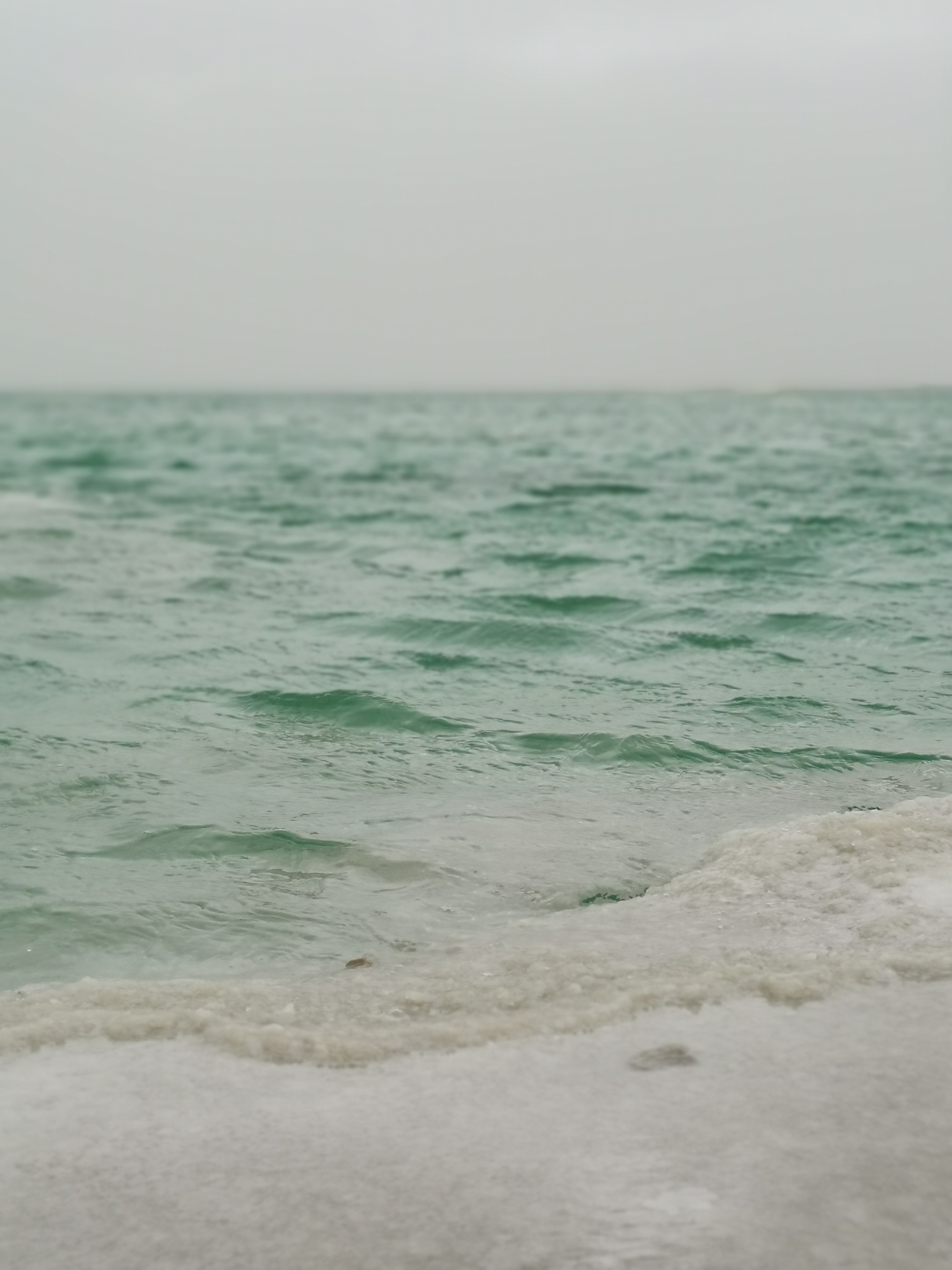 תמונה של חוף הים שבו יש מלח בלבד